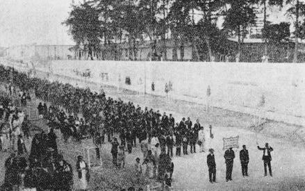 Marcha del 11 de marzo de 1920 pasando por la Penitenciaría Central de Guatemala.